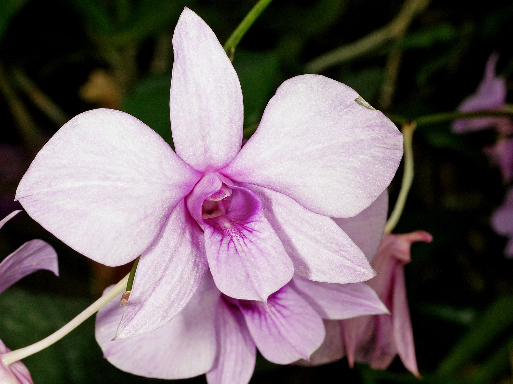 Dendrobium bigibbum